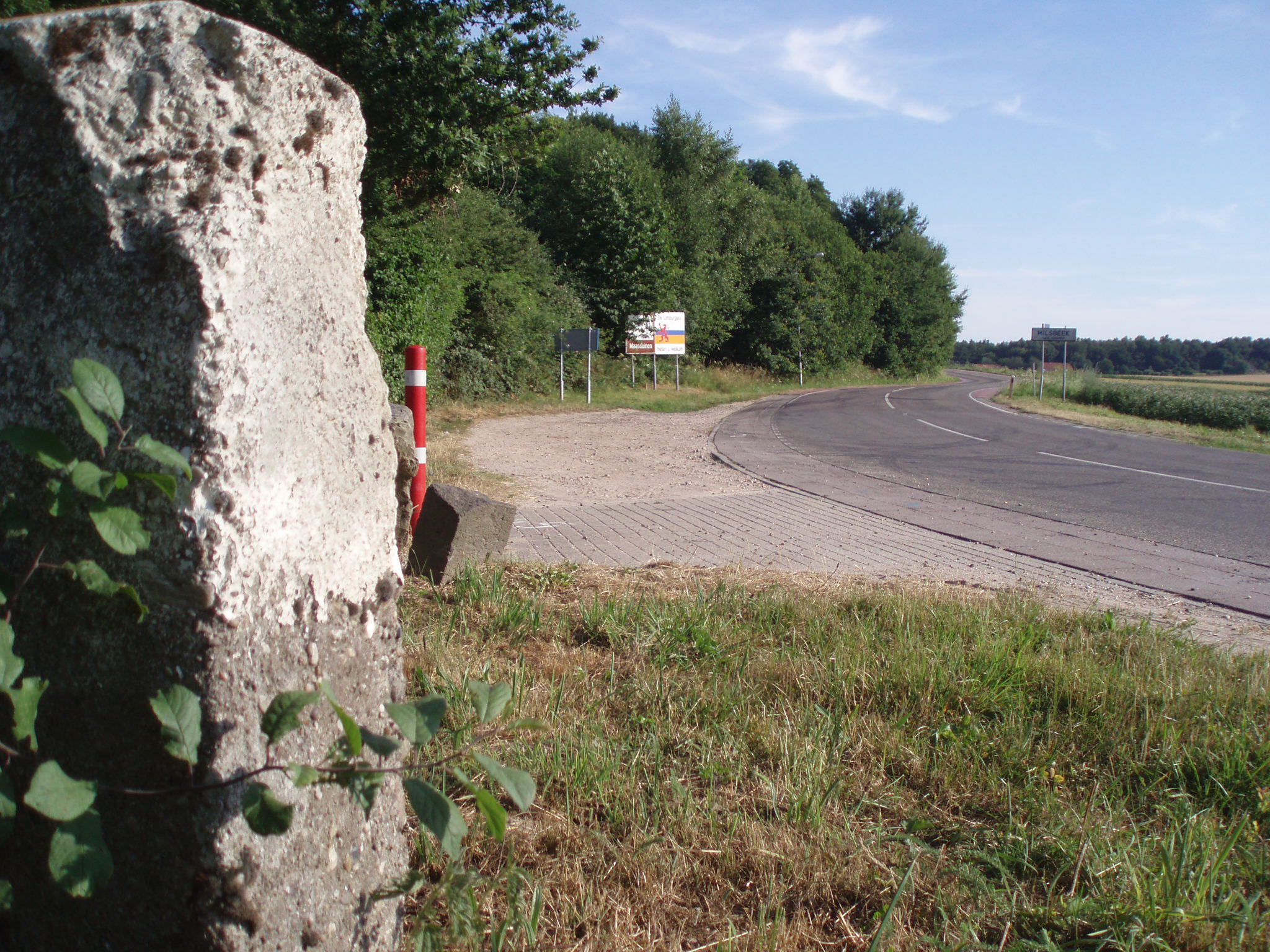 eigen foto 2006 (c) looi